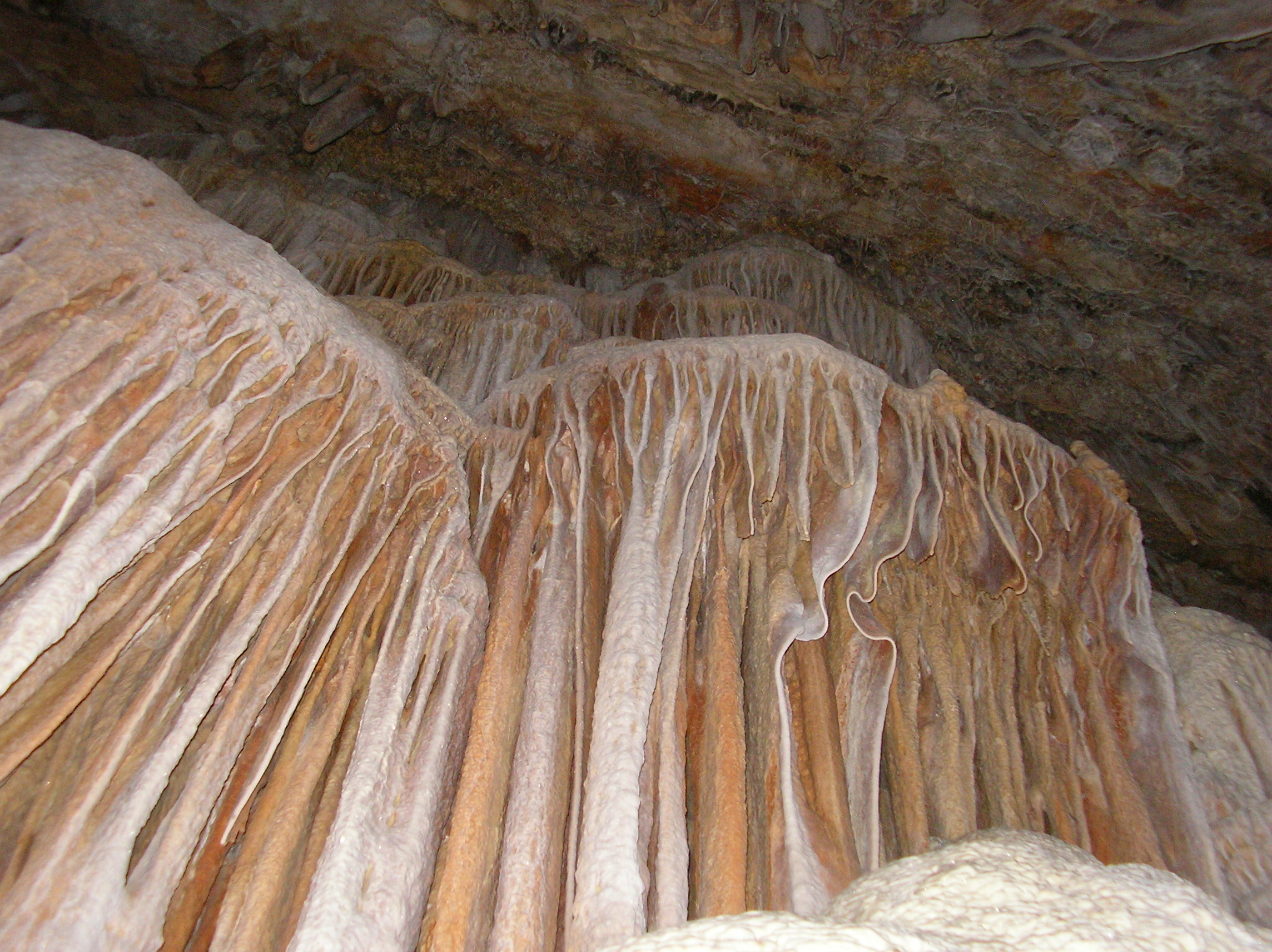 מערת_הנטיפים_החדשה